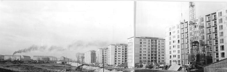 Hoyerswerda, Hochhäuser, Wohnungsbau Zentralbild Zühlsdorf 8.12.1960 Hoyerswerda im Aufbau Unweit des Braunkohleveredlungskombinats "Schwarze Pumpe" wird für die Arbeiter dieses Industriegiganten die sozialistische Wohnstadt Hoyerswerda-Neustadt erbaut. Nach ihrer Fertigstellung wird die sozialistische Wohnstadt, die ausschließlich in der höchstentwickelten industriellen Bauweise aus Grossplatten und teilweise aus Grossblöcken gebaut wird, insgesamt 7 Wohnkomplexe mit über 8 000 Wohnungen sowie die entsprechenden sozialistischen und kulturellen Nebeneinrichtungen umfassen. UBz: Ein Teil der in Grossplattenbauweise errichteten Hochhäuser